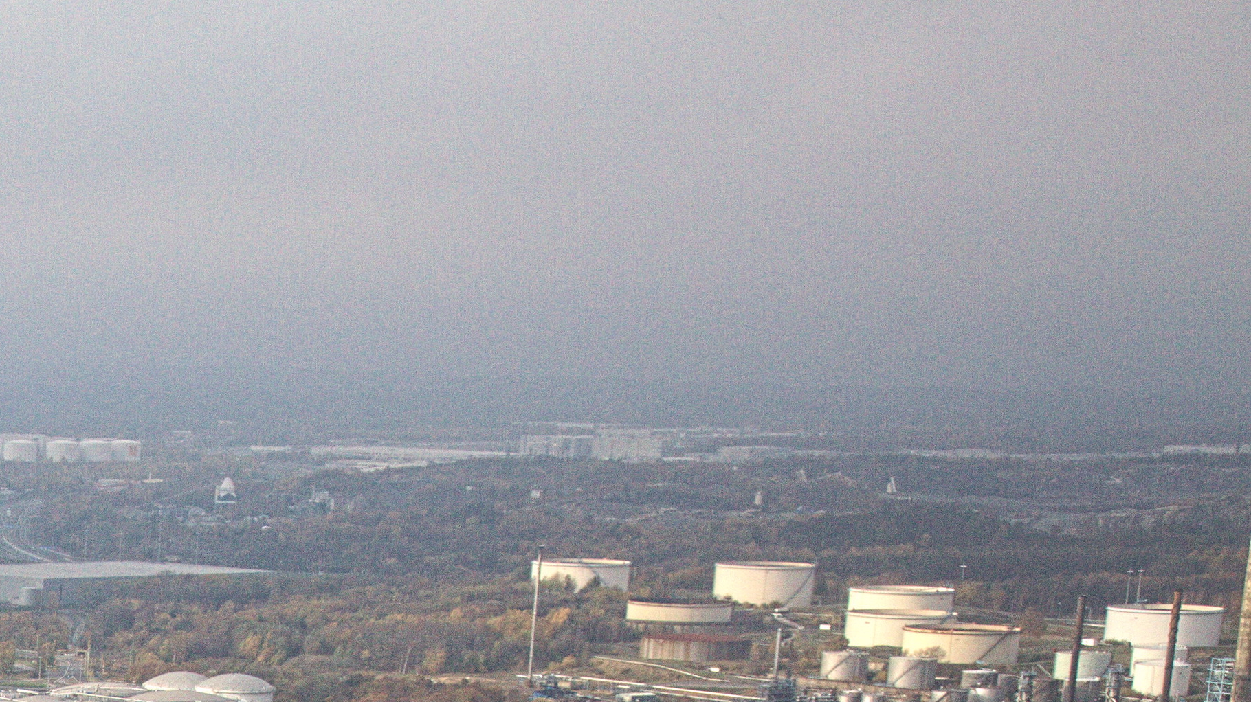 Avståndsbild på (delar av) Torslandaverken i Göteborg.